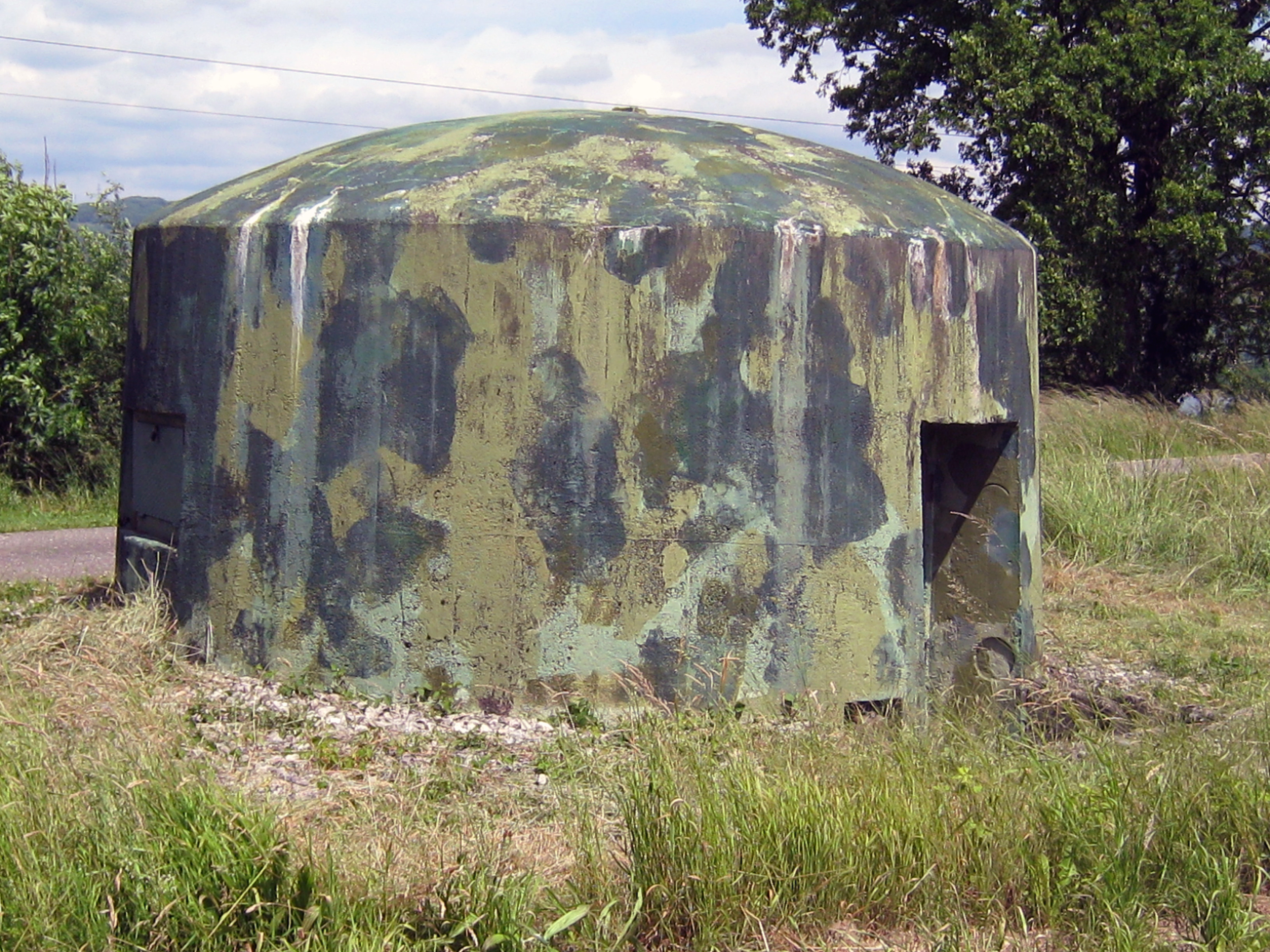 Aufnahme der Anlage A 4247 Bernau ("Strahler"), Leibstadt